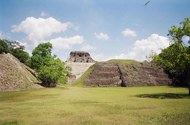 Maya ruins of Xunantunich